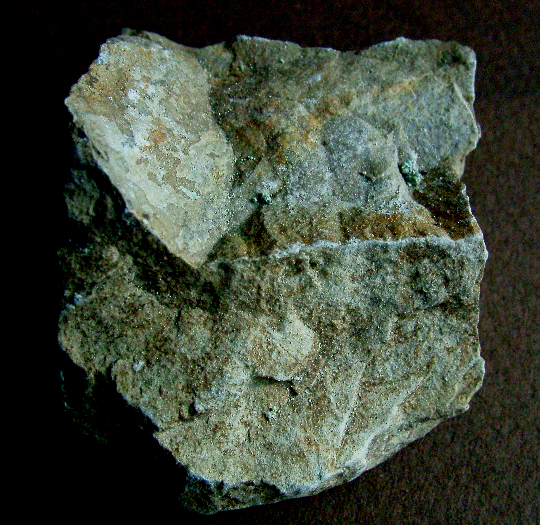 Kőzetminta a felsőörsi geológiai bemutatóhelyről